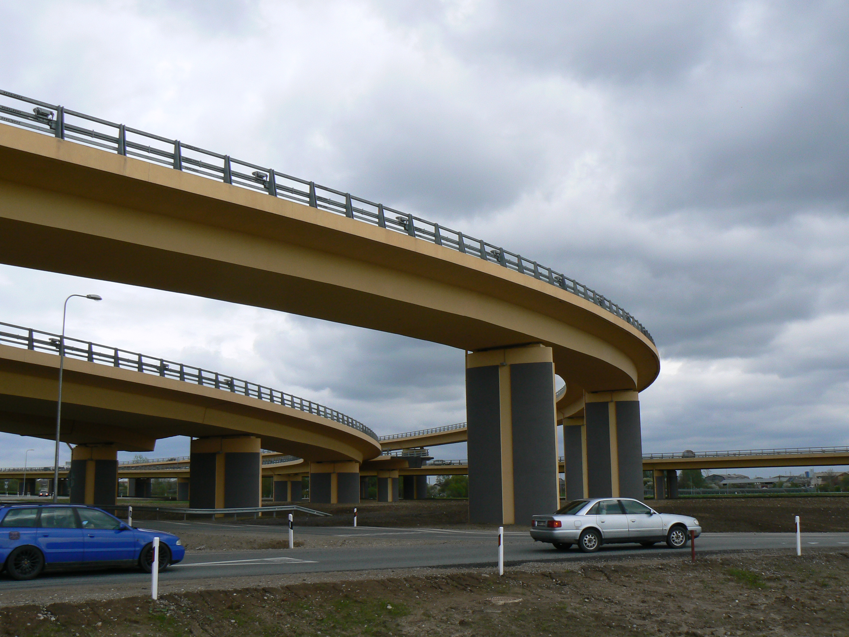 Stav mimoúrovňové dálniční křižovatky na dálnici A1, která má nahradit dosud částečně fungující silniční okruh Jakai, k datu květen 2013. V provozu jsou již směry: Klaipėda - Kaunas a opačně, Kaunas - Palanga a opačně. Původní silniční okruh je na tuto MÚK napojen a zatím funguje pro směry Palanga - Klaipėda (Baltijos pr.) a opačně, Šilutė - do všech směrů a opačně, Jakai - do všech směrů a opačně, Klaipėda (Sendvaris) - do všech směrů a opačně, různé odbočky do Sudmantů (do několika částí) - vždy jednosměrně.